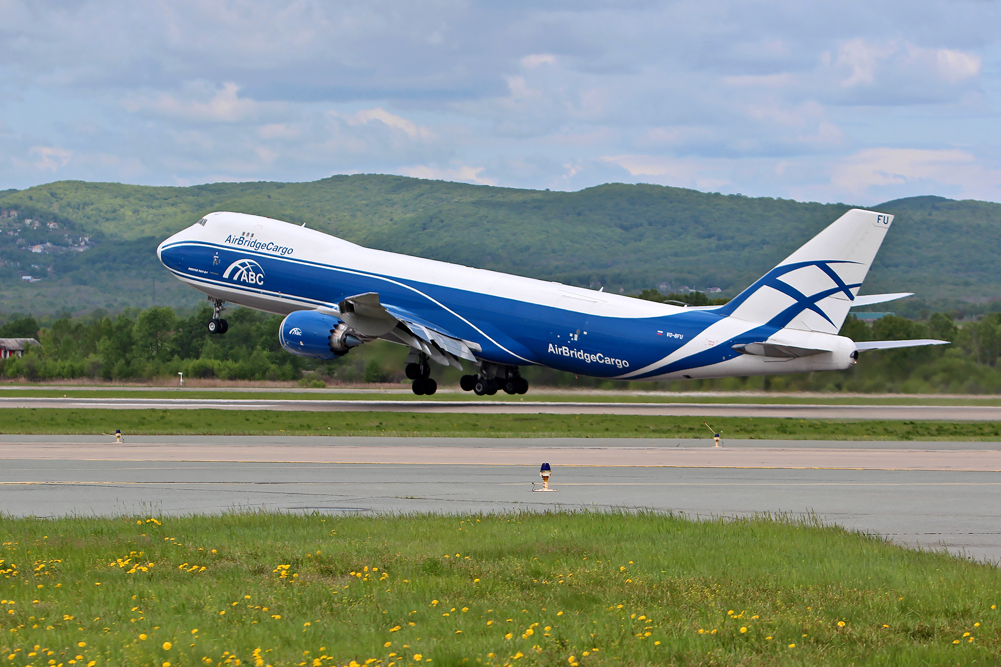 Boeing 747 авиа компании Air Bridge Cargo во Владивостоке